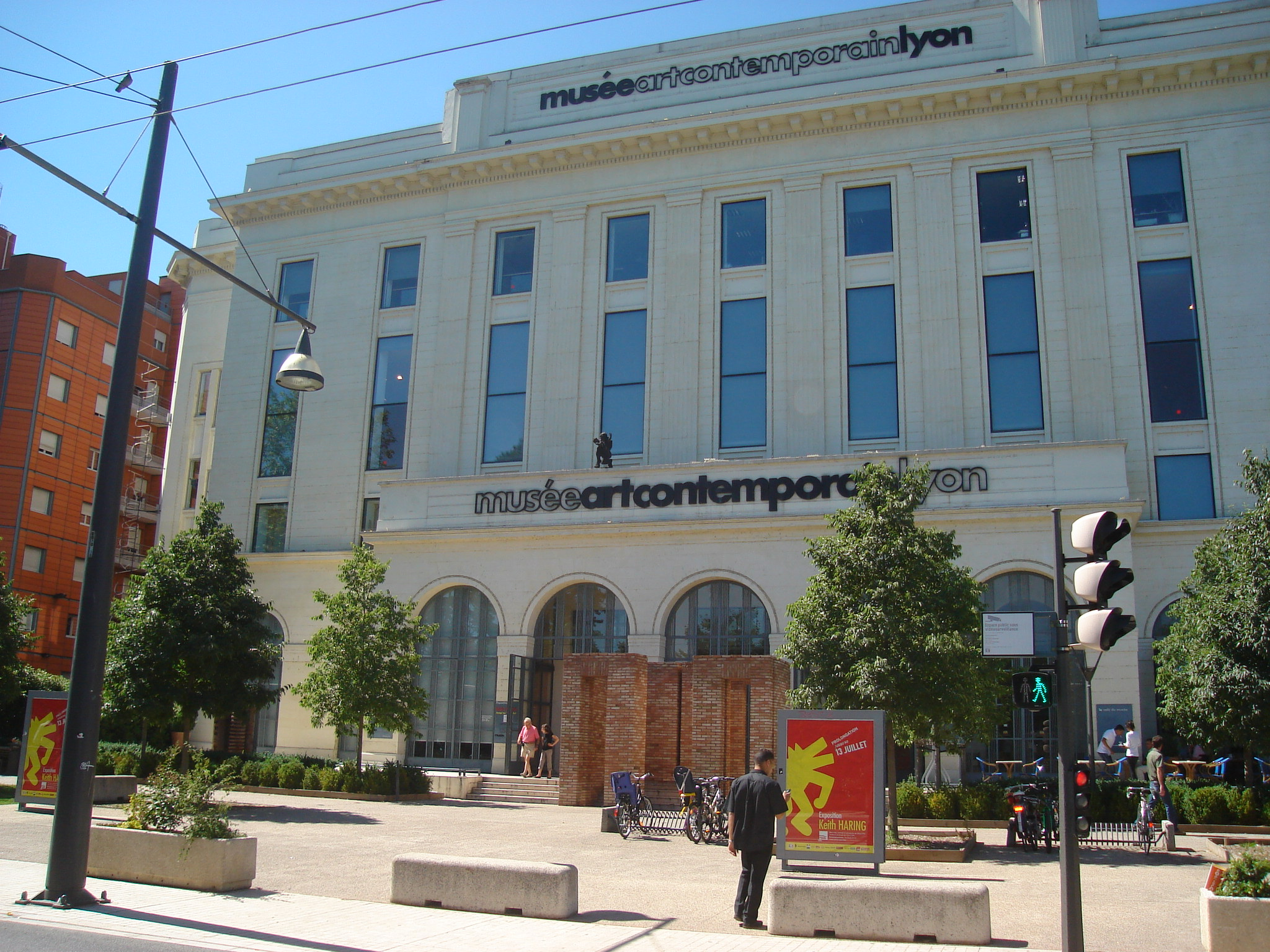 Musée d'art contemporain de Lyon, Cité Internationale (designed by Charles Meysson (1869-1947).